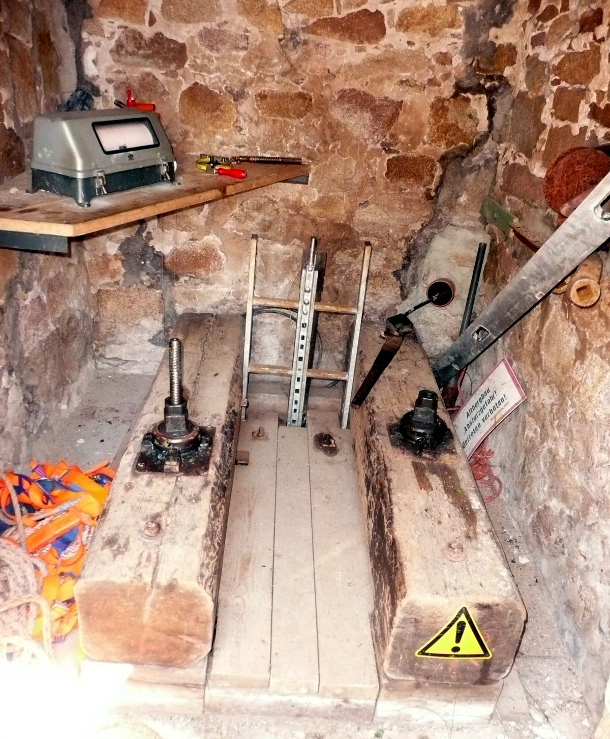 Innenansicht des Striegelhäuschens auf der Staumauer des Oderteichs